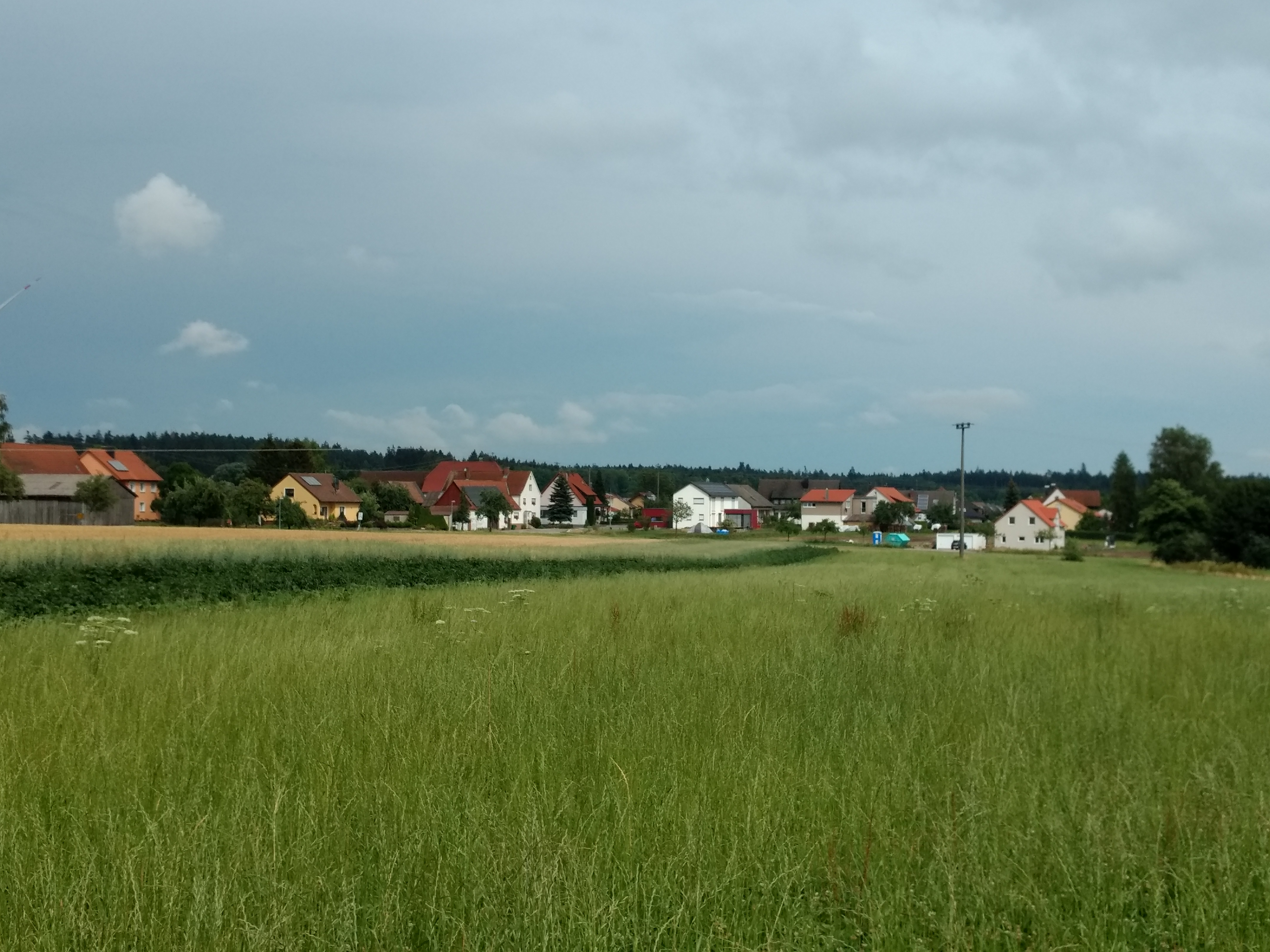 Wäldershub